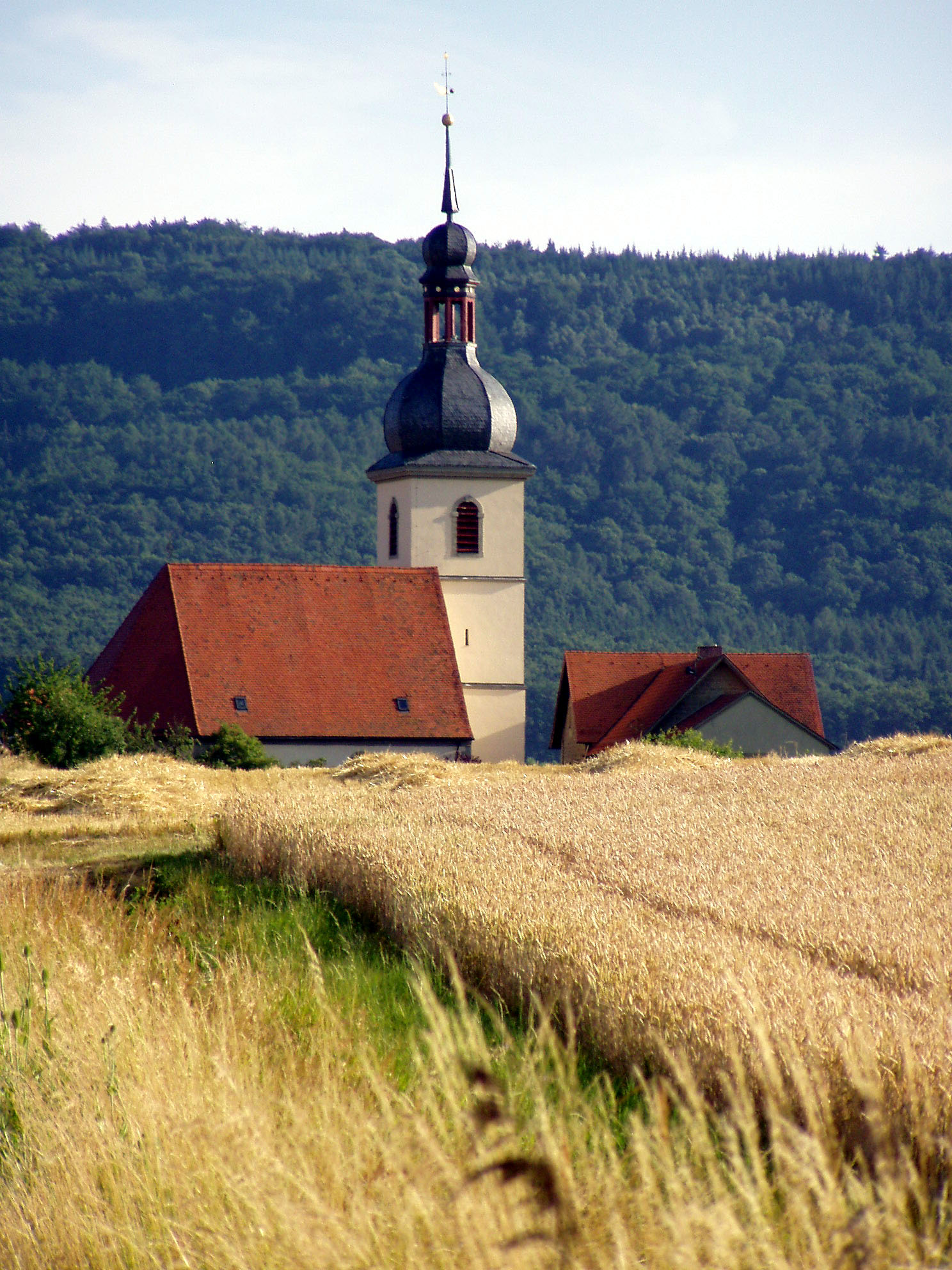 Die evangelische Dorfkirche von Wiesenbronn / Unterfranken